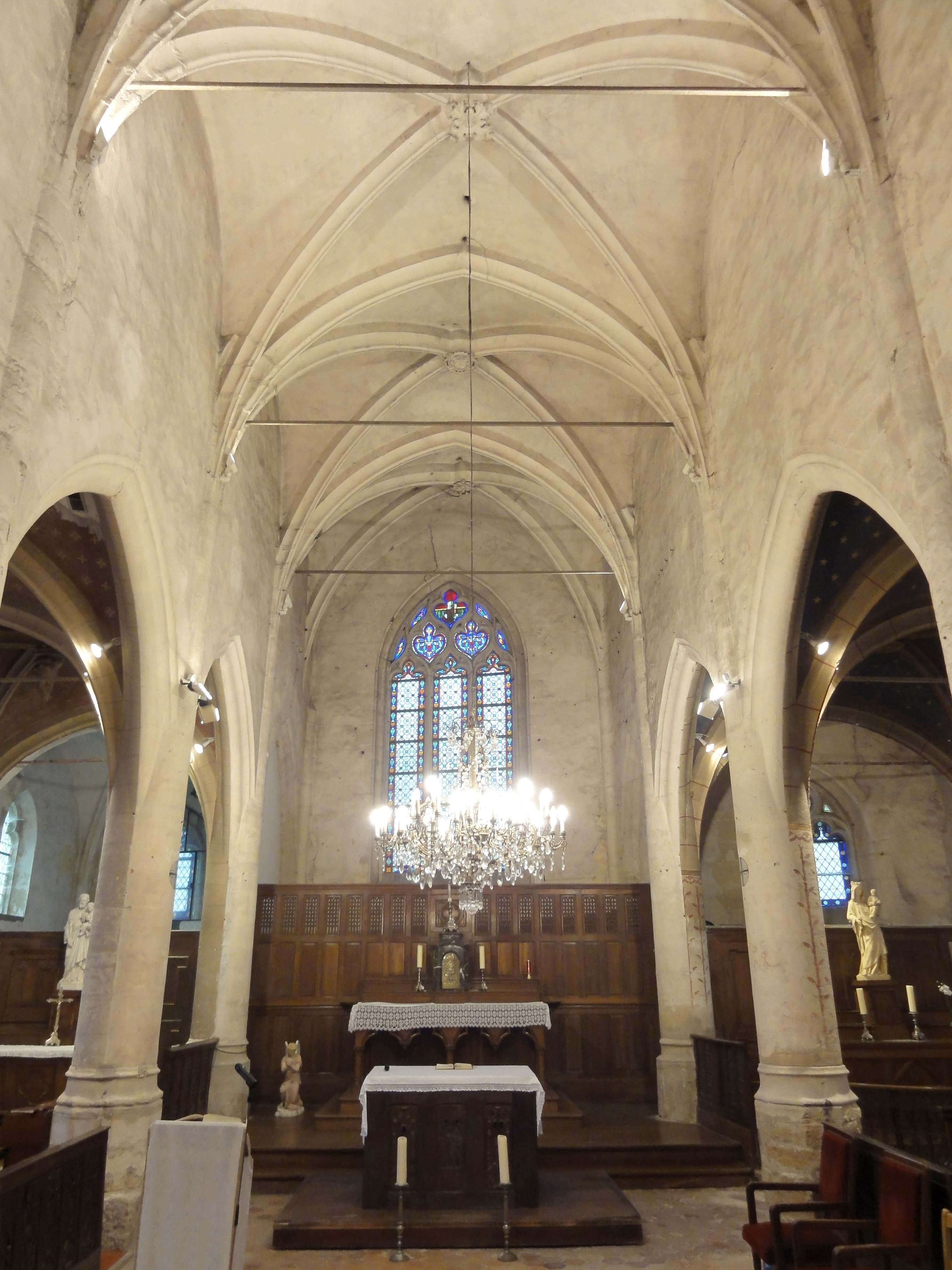 Intérieur de l'église de l'Assomption de Notre-Dame - voir titre.